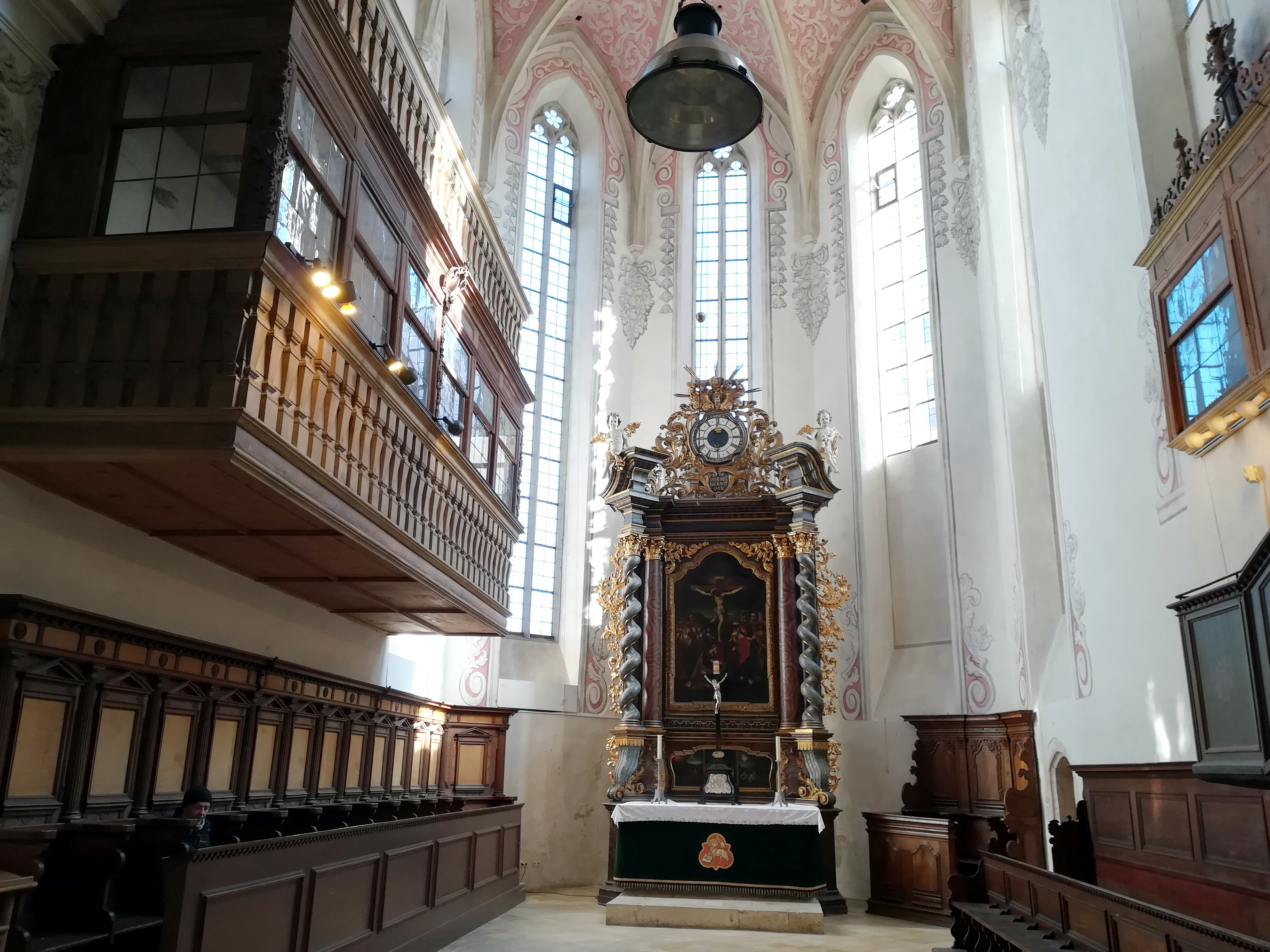 Die Kirche St. Oswald ist eine evangelisch-lutherische Kirche in Regensburg.